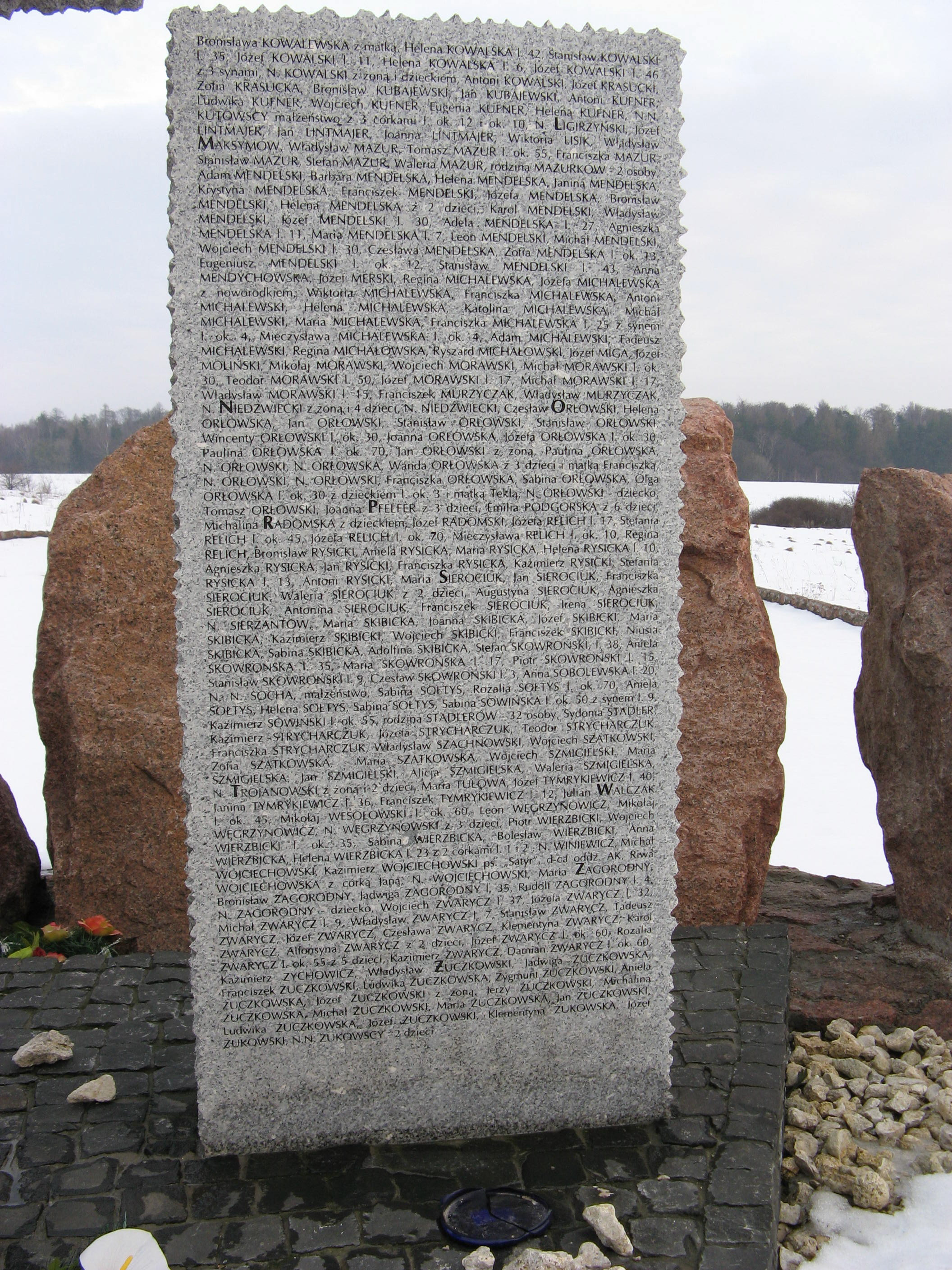 Tablica z nazwiskami pomordowanych Polaków - fragment pomnika w miejscu, gdzie była wieś Huta Pieniacka.